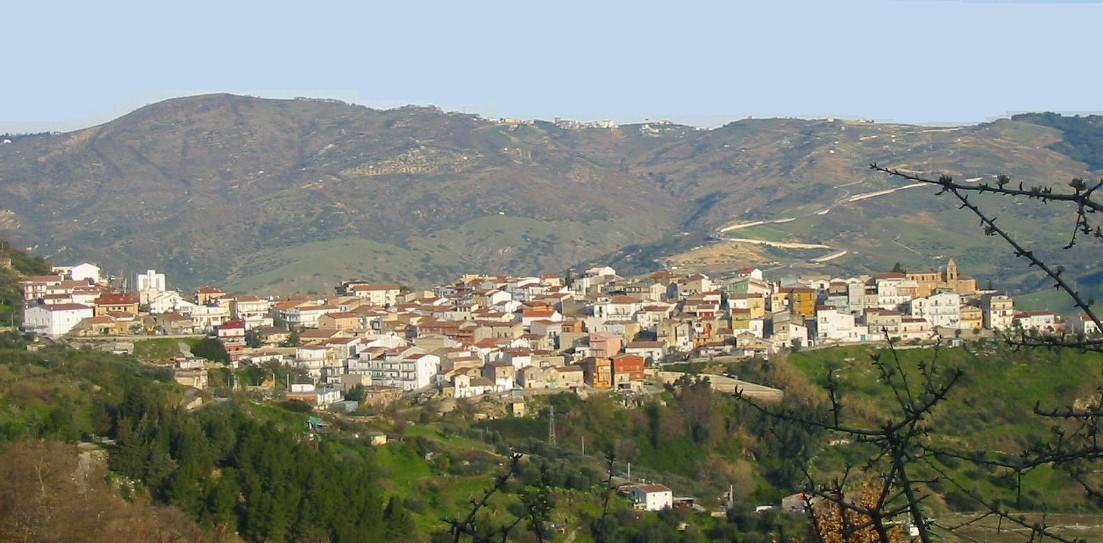 Panorama di Calciano (Matera) 2